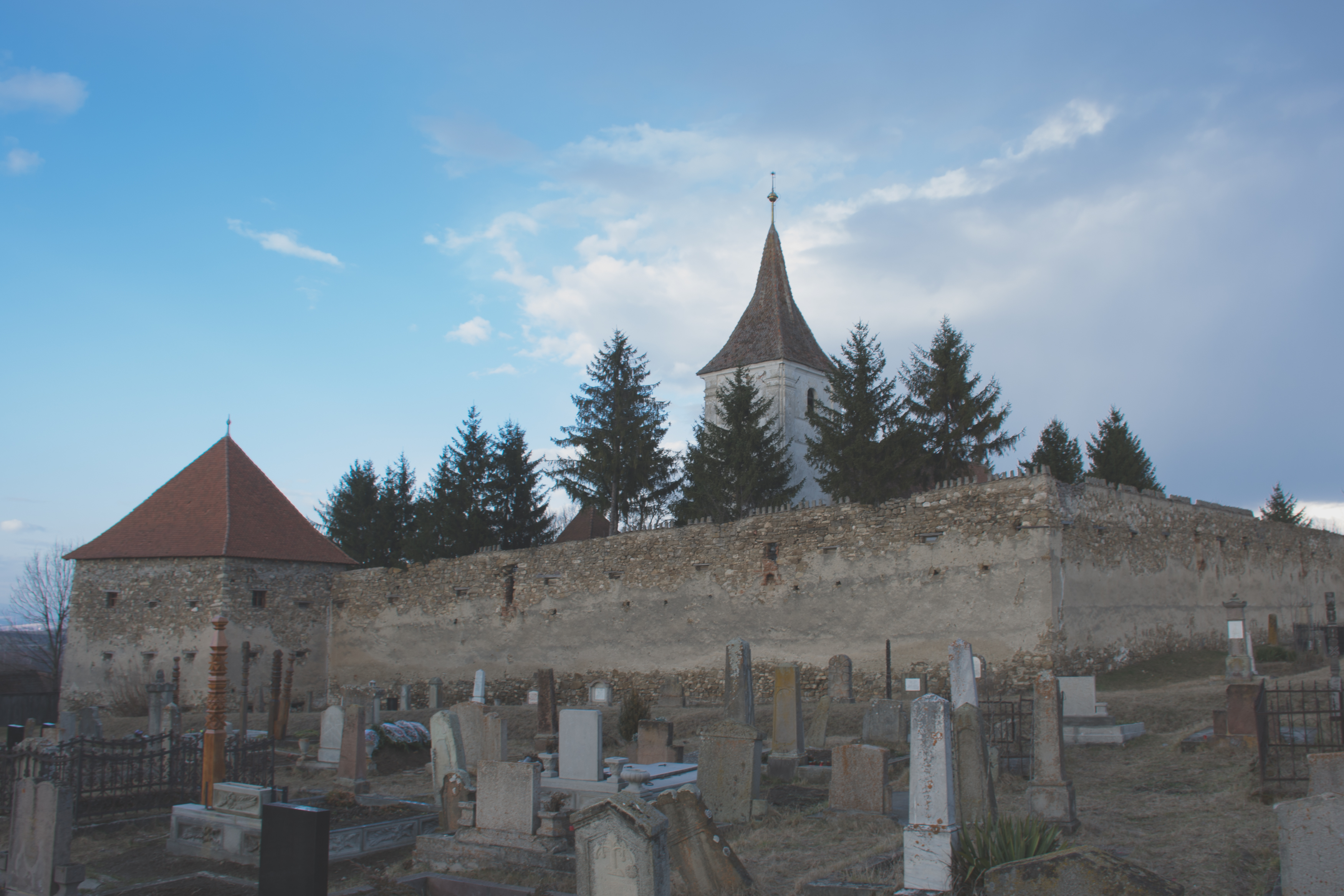 Incinta fortificată 02